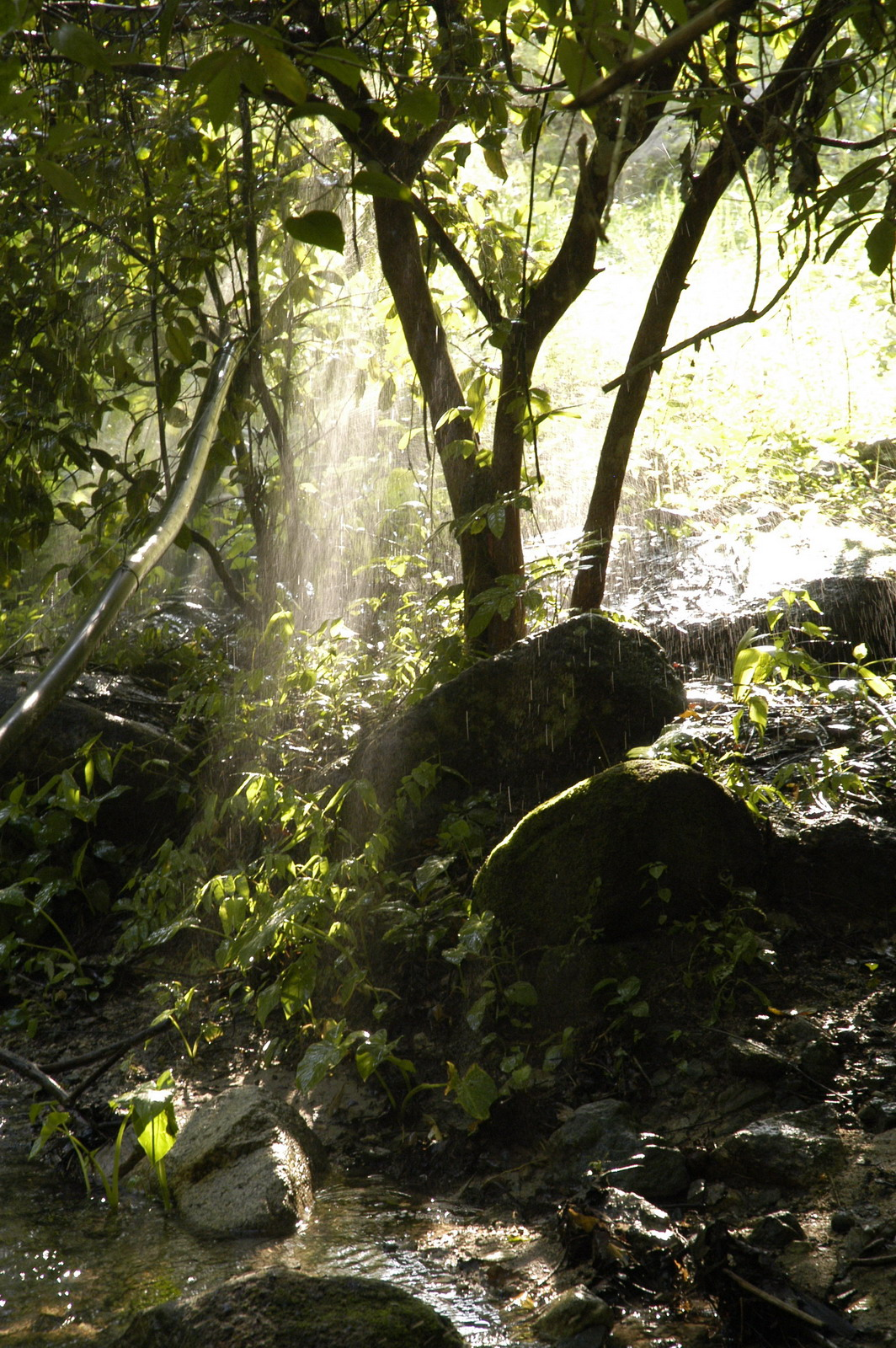 Sierra Madre - inside of jungle Autor: Perojevic